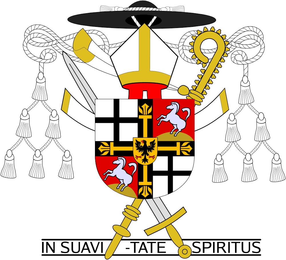 Piotr Jaworski; PioM EN DE PL 01:36, 26 July 2005 (UTC); POLAND/Poznań; Dr Bruno Platter COAT OF ARMS from Teutonic Order (DE: Deutscher Orden, PL: Krzyżacy); License for file